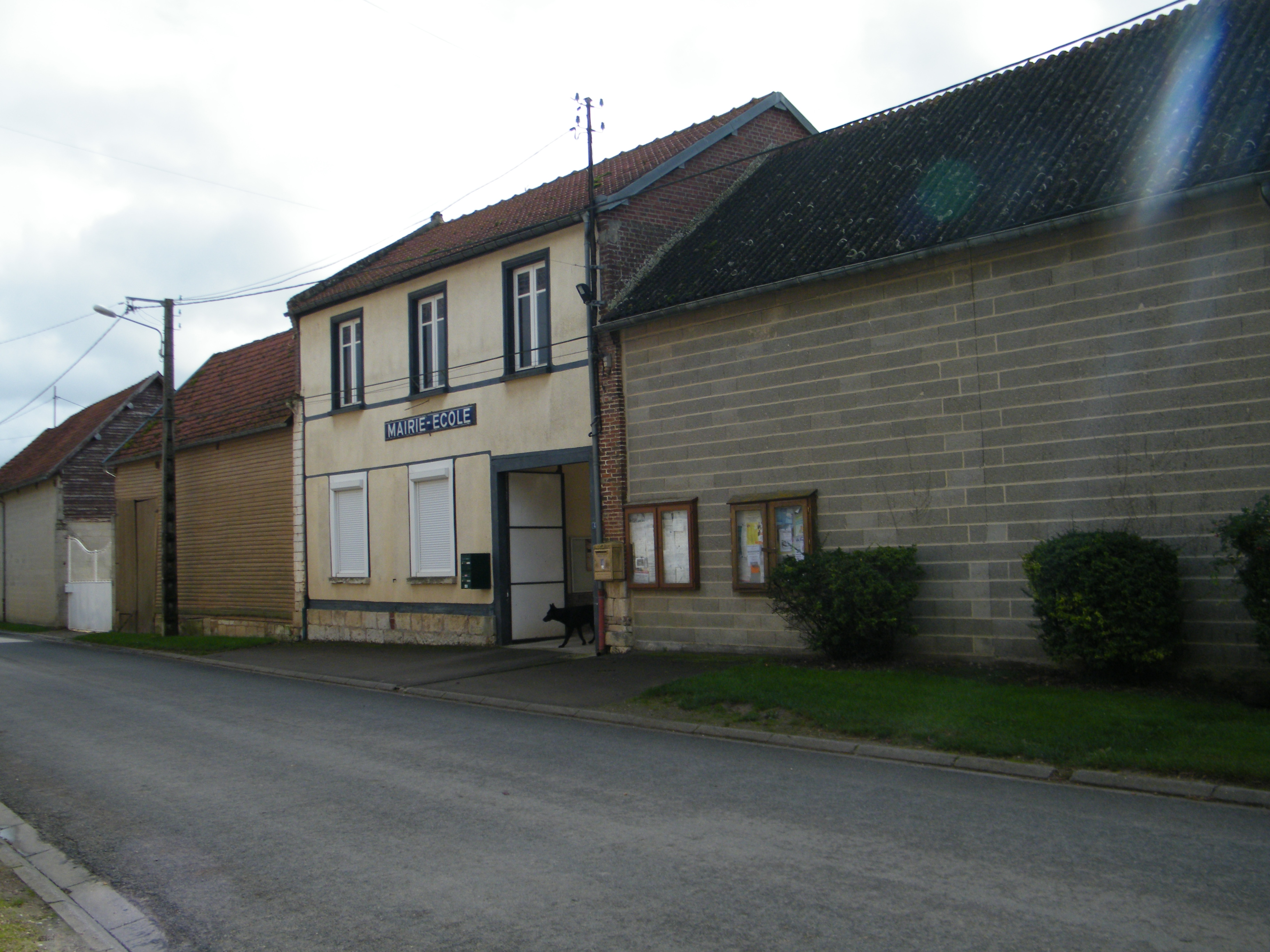 Mairie.